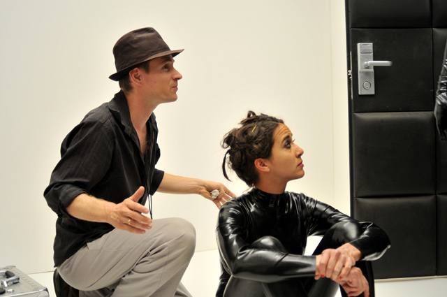 A Bibliotheque Pascal_forgatásán. Hajdu Szabolcs rendező, és felesége Török-Illyés Orsolya színésznő.